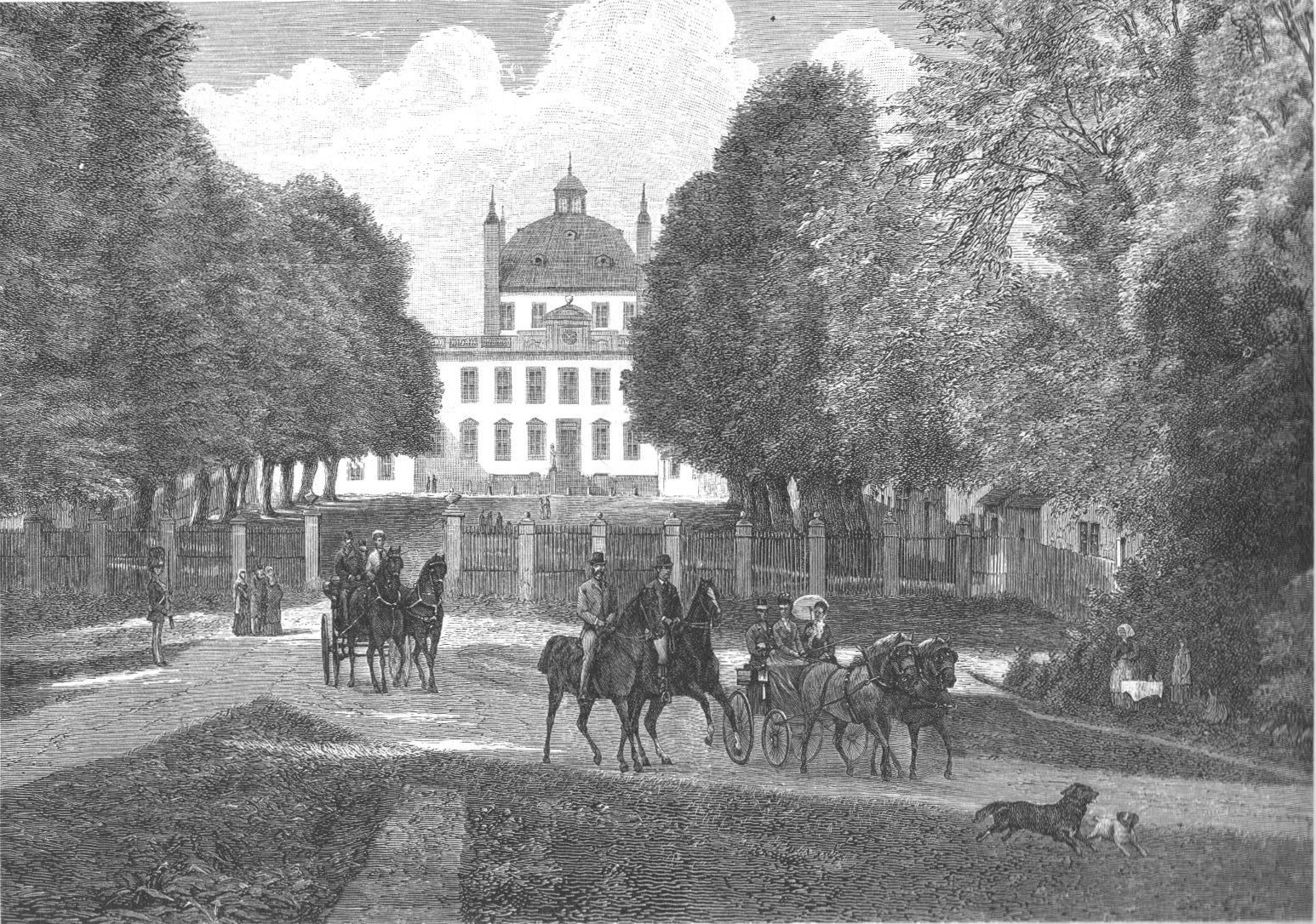 Indkørslen til Fredensborg Slot (1880). Slottet er opført 1720 af Frederik IV.